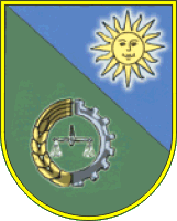 Герб Ярмолинецького району